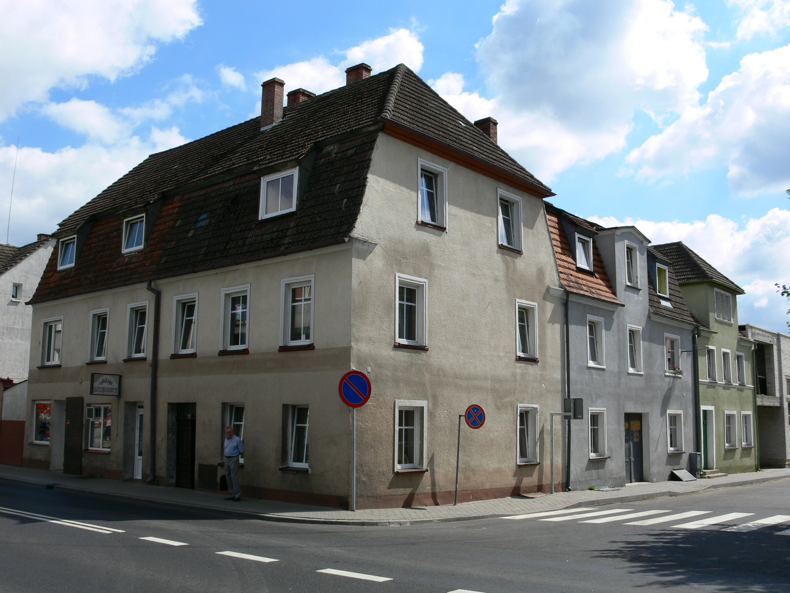 Kalisz Pomorski - Kamieniczki zabytkowe w centrum miasta